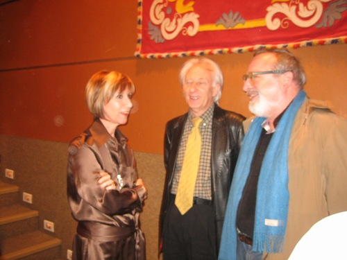 acto de la asociación UPyD